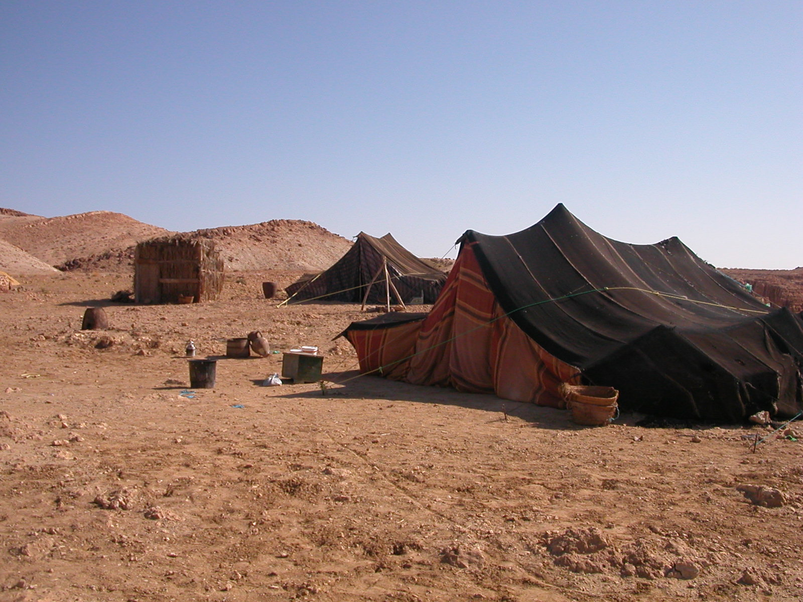 Beduinska vas na visokogorski planoti v Atlaškem gorovju